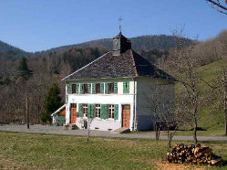 Mairie de Riervescemont (Territoire de Belfort, France) Licence GFDL Photo prise le 29 mars 2003 par LP90 LP90